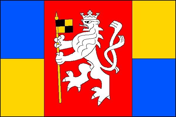 Vlajka obce Rozhovice